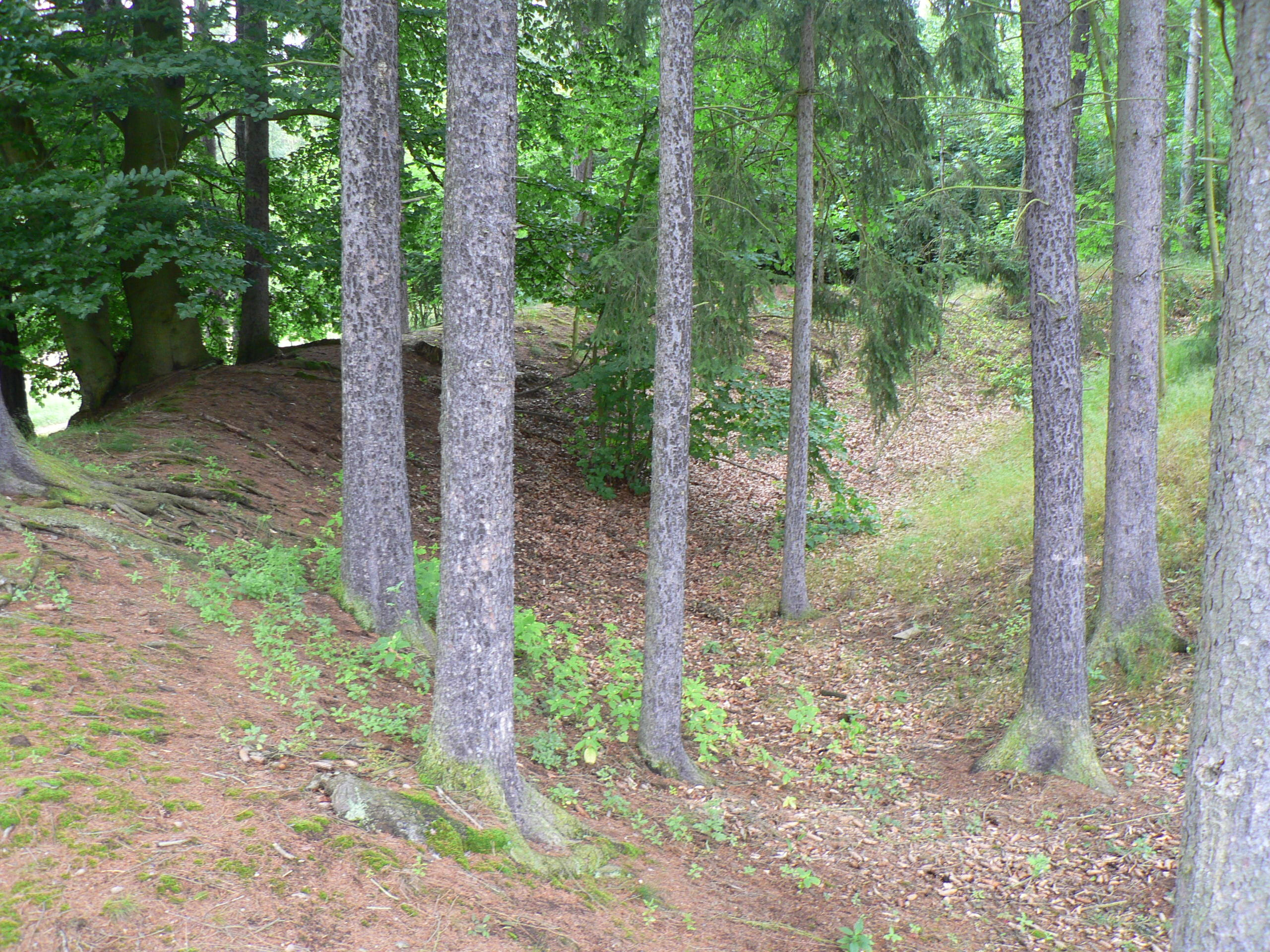 Tvrz Šebíkov, okrouhlé tvrziště